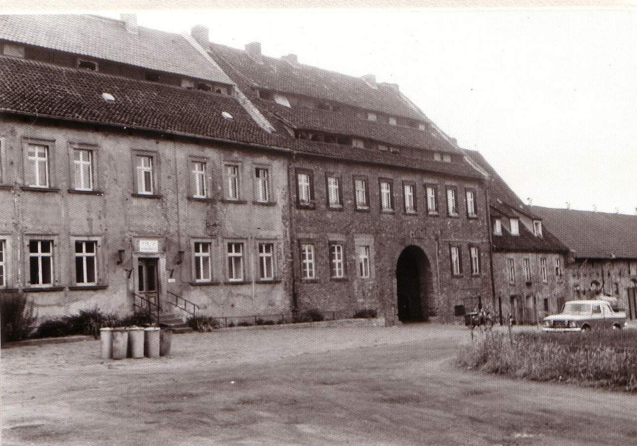 Althaldensleben, farm